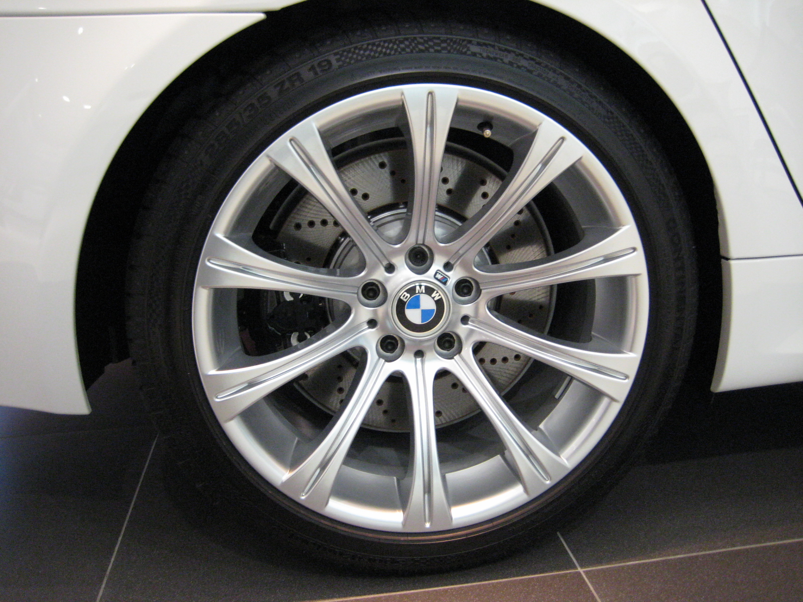 BMW E60 M5 Wheel R19